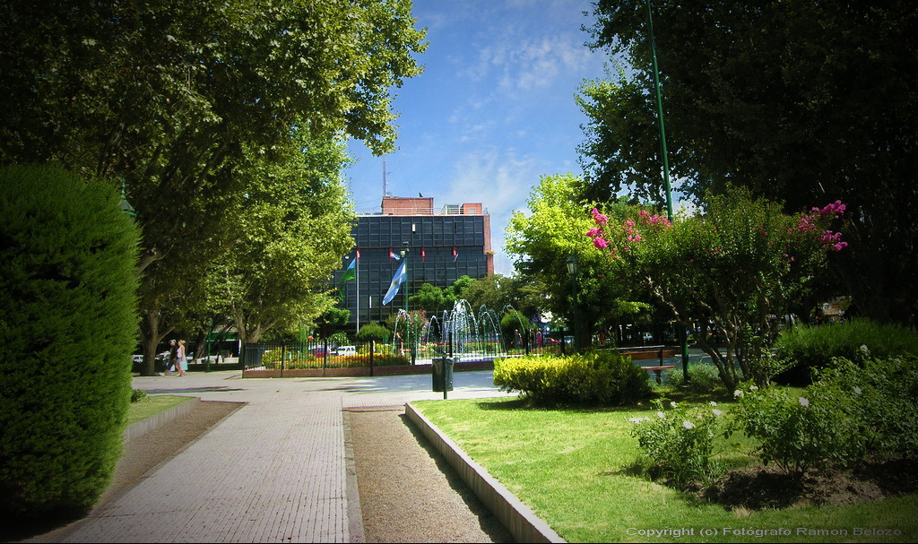 Plaza B. Mitre, Monte Grande.